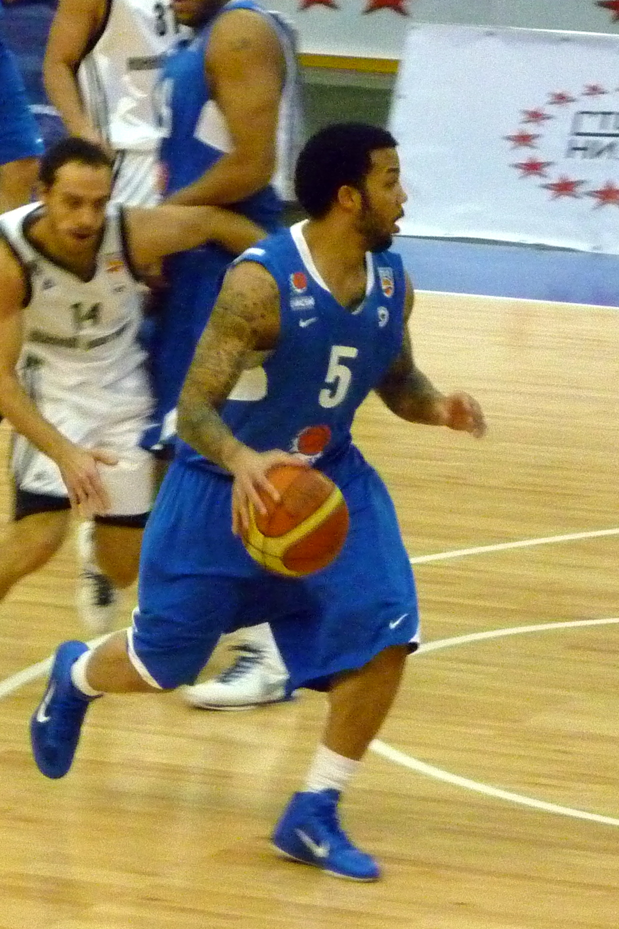 Защитник БК «Енисей» Маркус Уильямс в матче против БК «Нижний Новгород» 18 декабря 2010 года